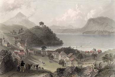 Georgeville, circa 1840.